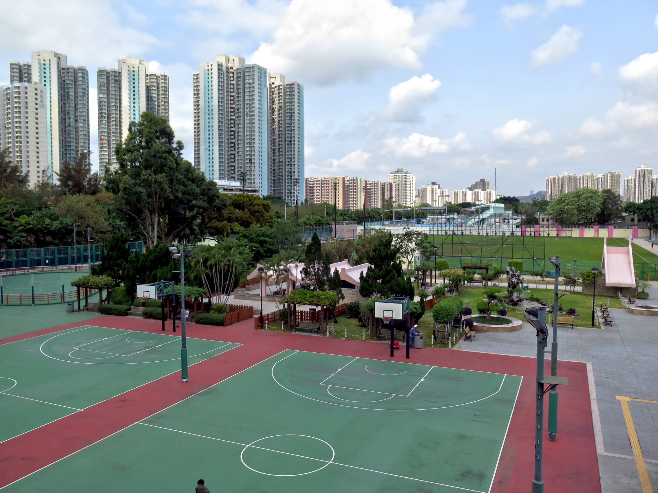 Fanling Playground